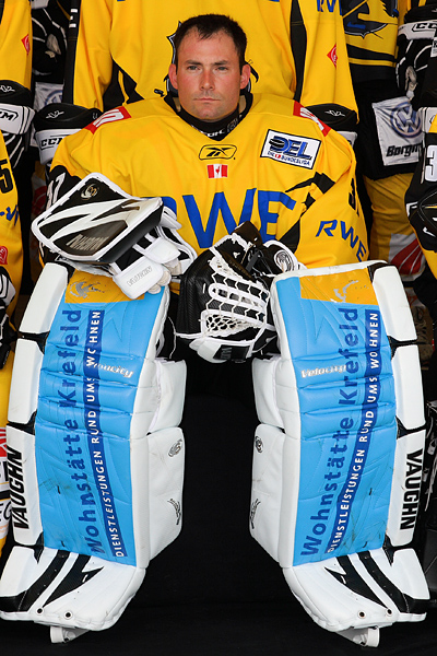 Scott Langkow im Dress der Krefeld Pinguine, Saison 2008/2009